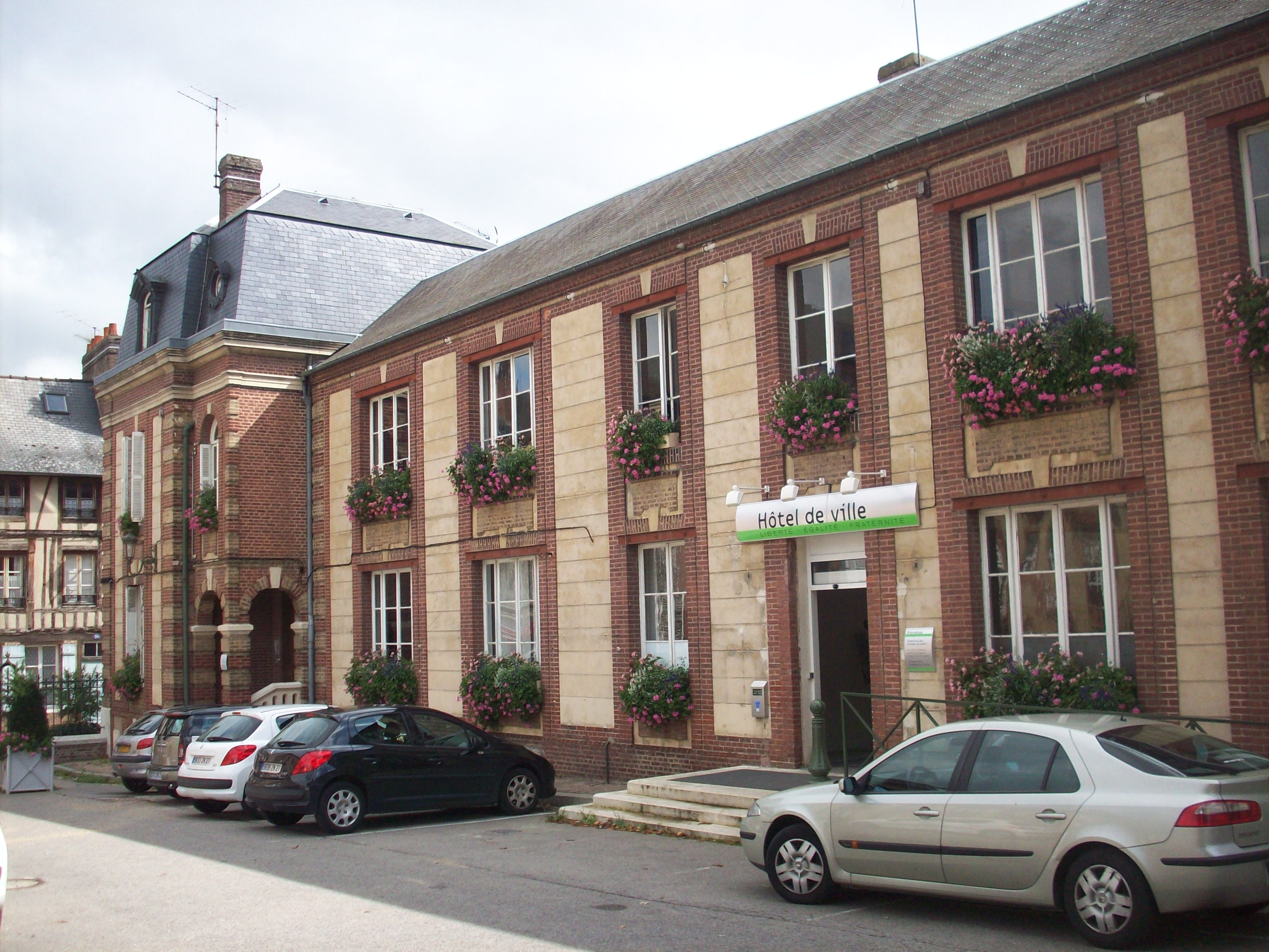 Hôtel de ville de Louviers.